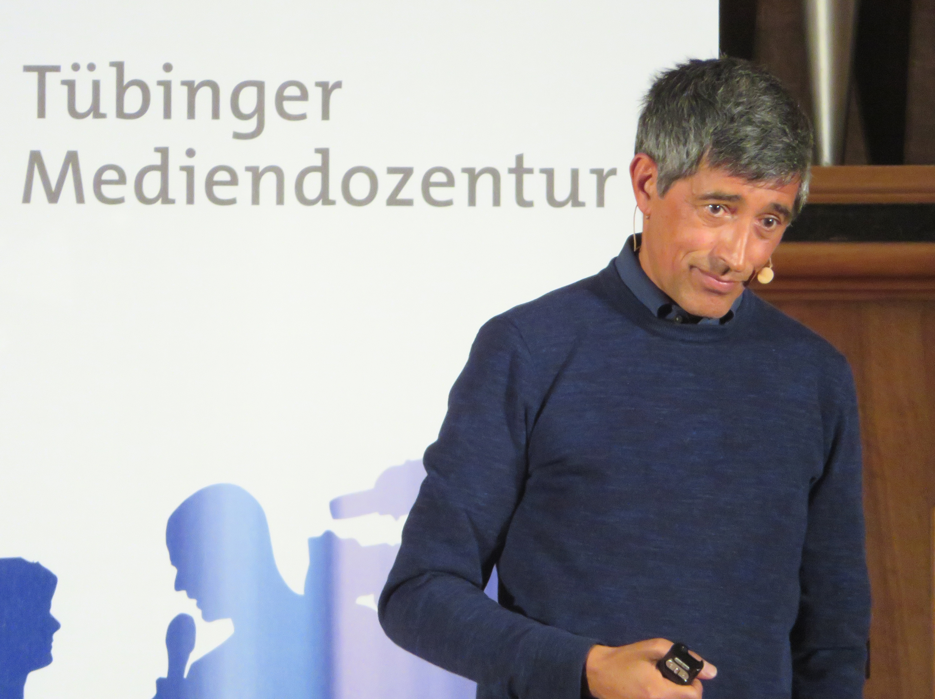 Ranga Yogeshwar (* 1959), luxemburgischer Physiker, Wissenschaftsjournalist und TV-Moderator, bei seinem Vortrag zum Thema „Mensch oder Maschine – wer programmiert wen?“ im Rahmen der 16. Tübinger Mediendozentur an der Eberhard Karls Universität Tübingen.